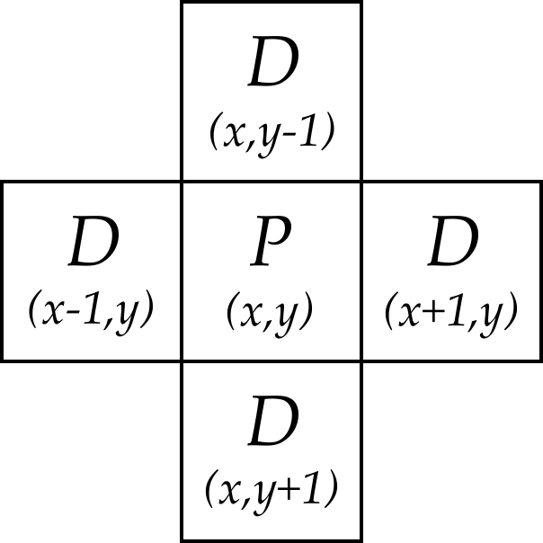 Vierer-Nachbarschaft / 4-Nachbarschaft um den Mittelpunkt P 4-neighbourhood around the centre P